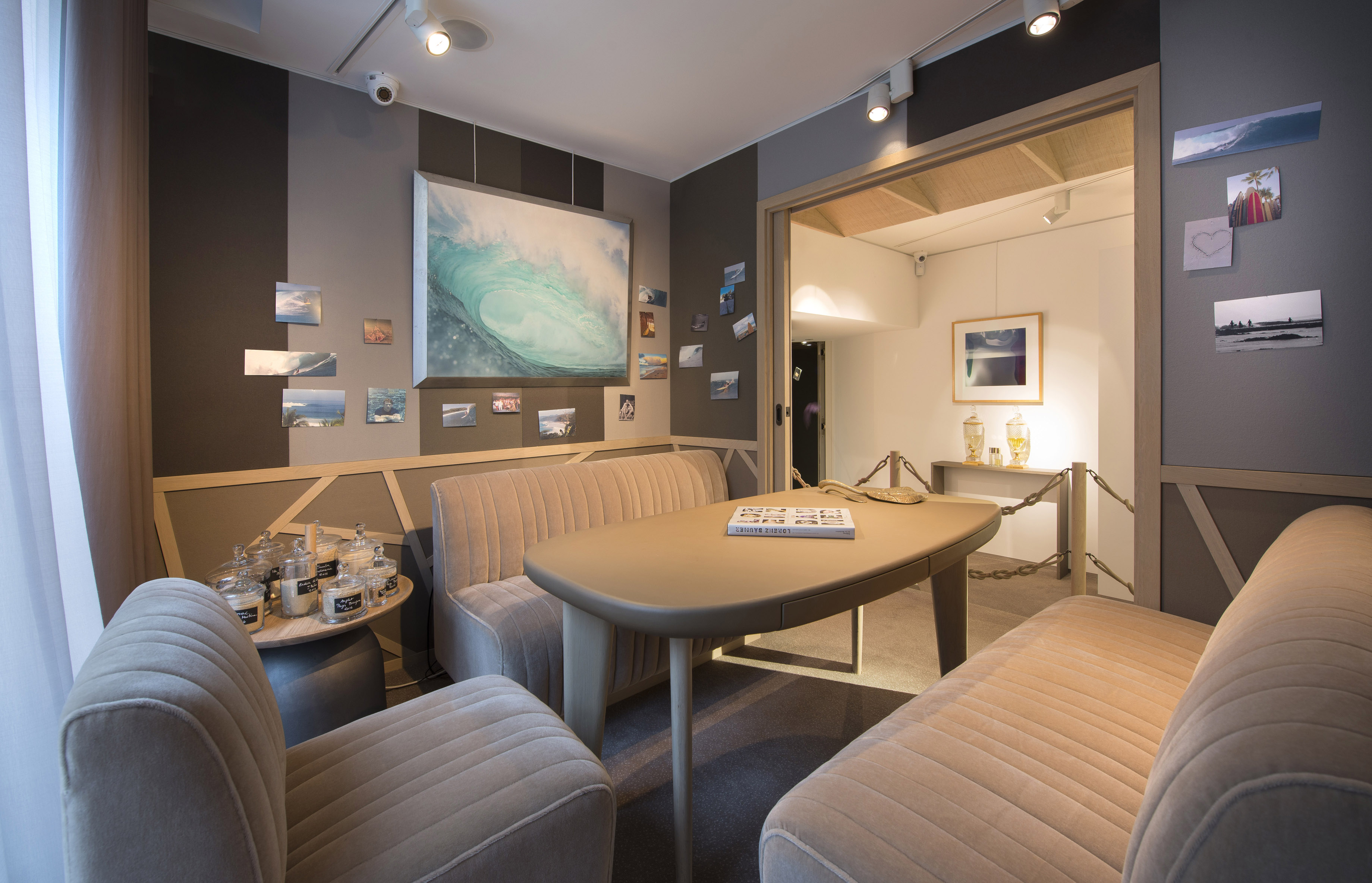 Nouvel écrin Lorenz Bäumer - Cabane du surfeur -19, place Vendôme, 75001 Paris